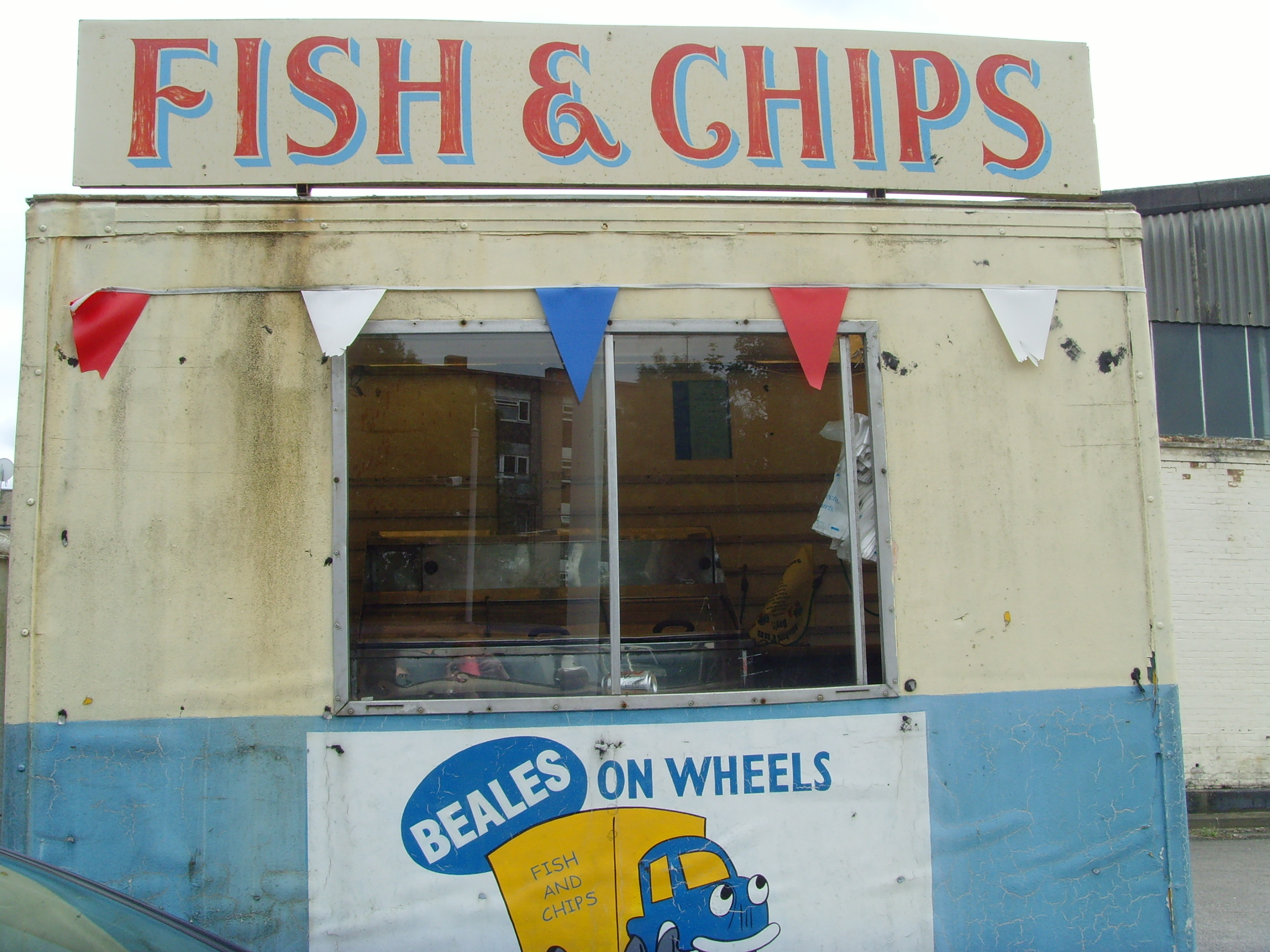 SNV31246.JPG